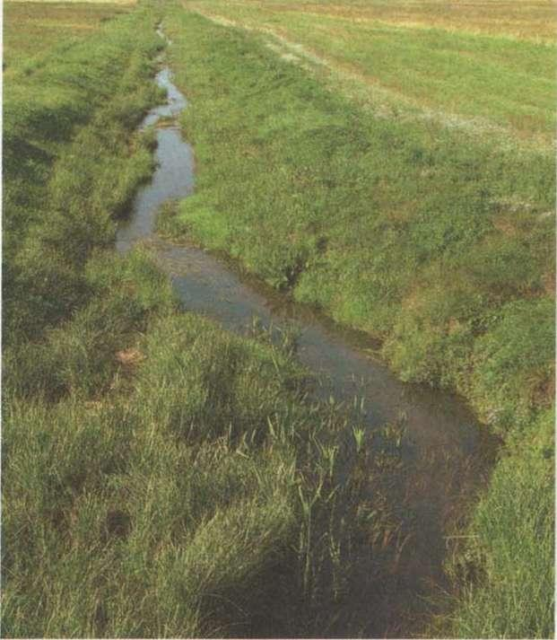 Река Днеприк в окрестности пос. Днеприк, иллюстрация